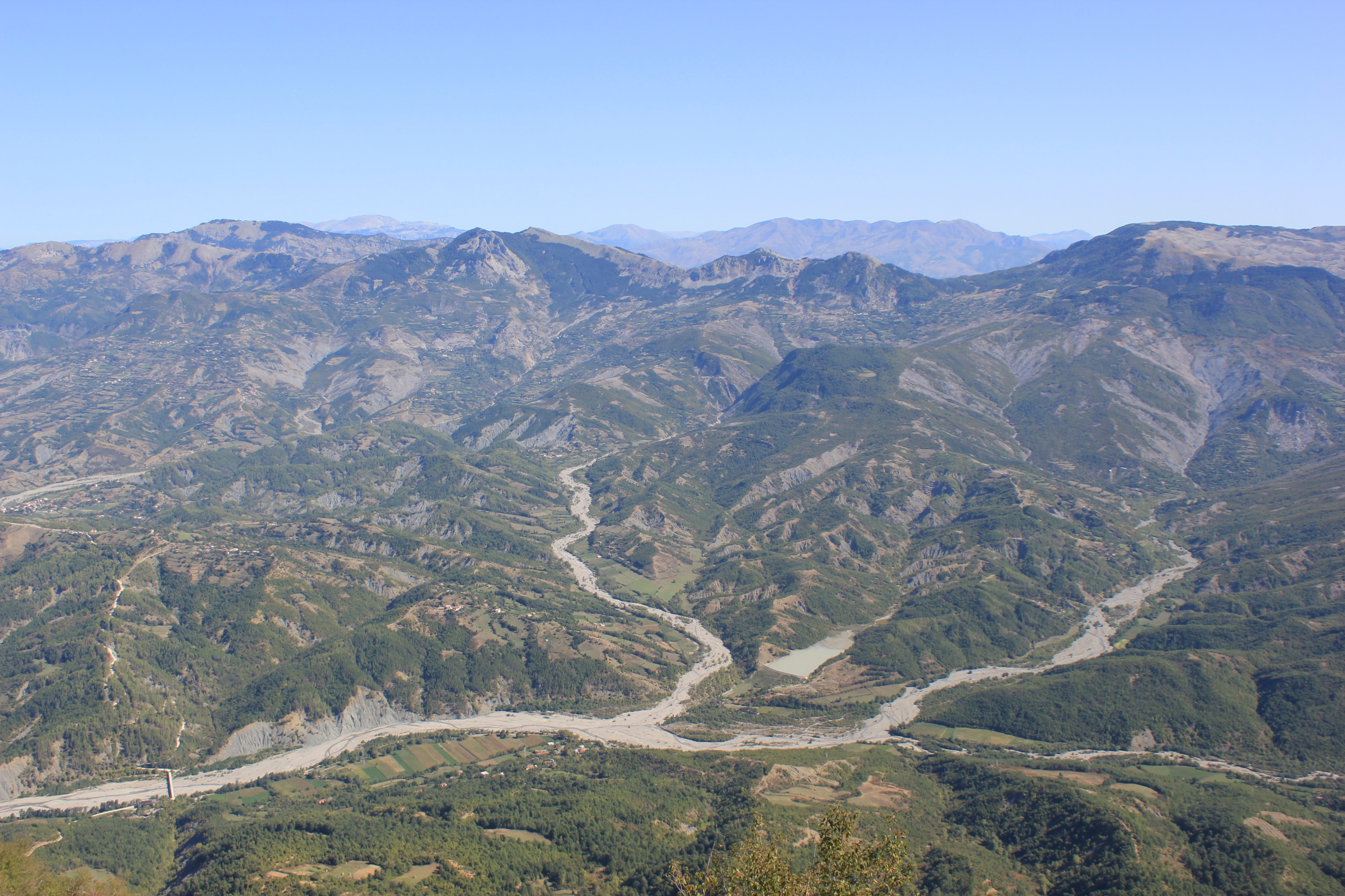 Blick vom Gipfel Maja e Tujanit am Dajti bei Tirana nach Norden.